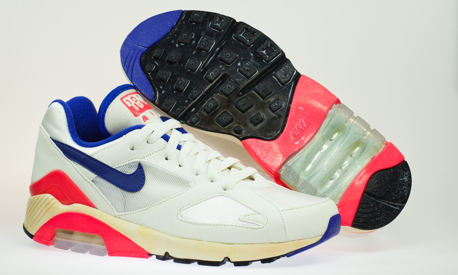 Nike Air Max '92 známe ako Nike Air Max 180